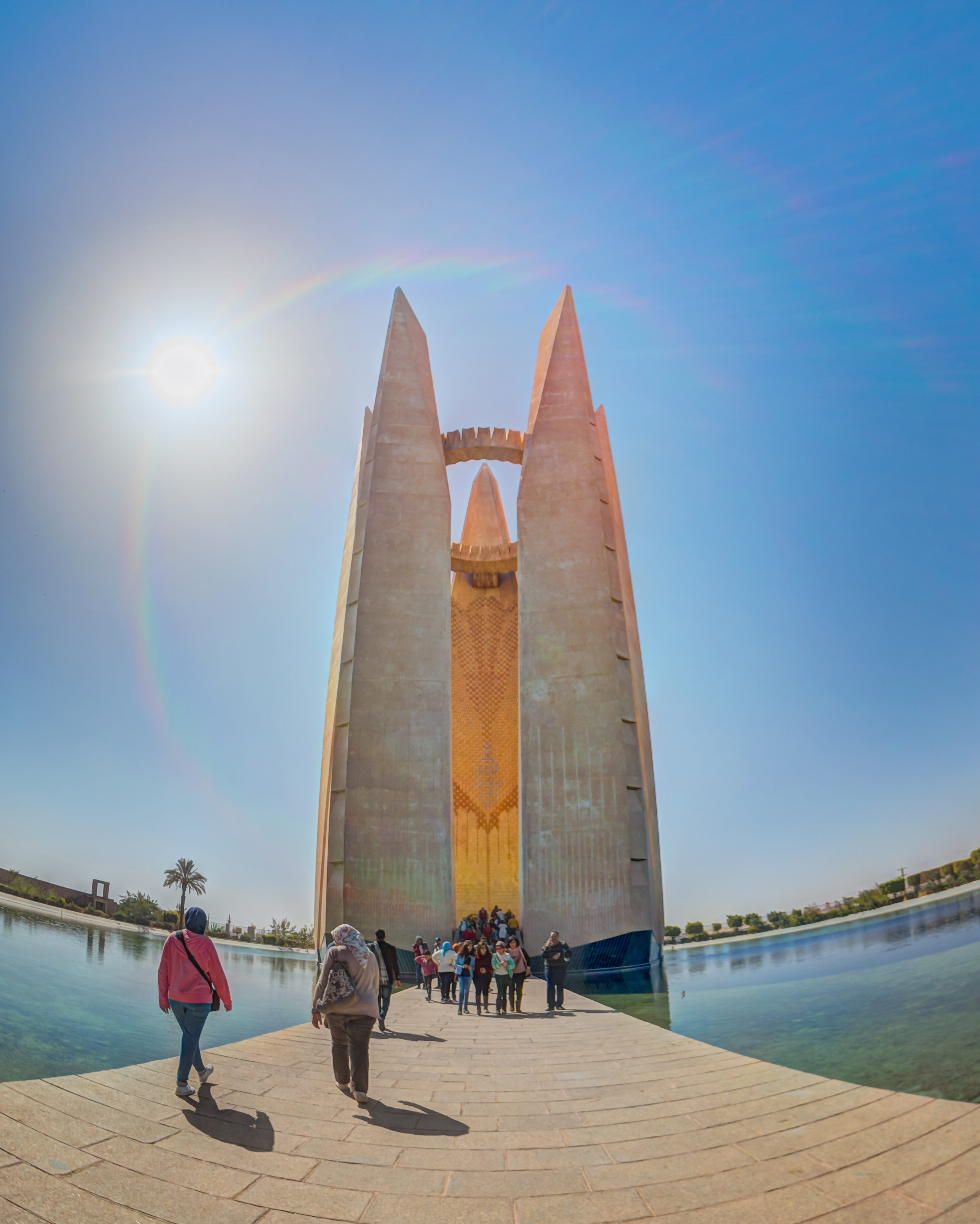 يعد "رمز الصداقة المصري الروسي بالسد العالي" من أهم العلامات التاريخية في تاريخ مصر عامة وأسوان خاصة، وهو ما اعتبر أكبر دليل على الصداقة المصرية الروسية. حيث تشهد محافظة أسوان في 15 يناير من كل عام احتفالية اليوبيل الذهبي بتحويل مجري نهر النيل، التي تقام برمز الصداقة المصري بالسد العالي، والذي يتزامن بالقومي القومي لمحافظة أسوان. ويقع رمز الصداقة المصرية السوفيتية بالقرب من جسم السد العالي جنوب مدينة أسوان، ويعد شاهدًا على قوة العلاقات المصرية الروسية منذ الزعيم الراحل جمال عبدالناصر. حيث طرحت مسابقة بين المهندسين المعماريين والشركات المتخصصة لإنشاء رمز يجسد روح الإرادة والتحدي بين للجانبين المصري والسوفيتي في إنشاء السد العالي عقب الانتهاء منه عام 1964، وقد صمم المهندس المعماري الروسي يوري أومليتر شينكو، رمز الصداقة المصرية الروسية الذي أنشئ في عام 1967، ويصل ارتفاعه يبلغ 72 مترًا.